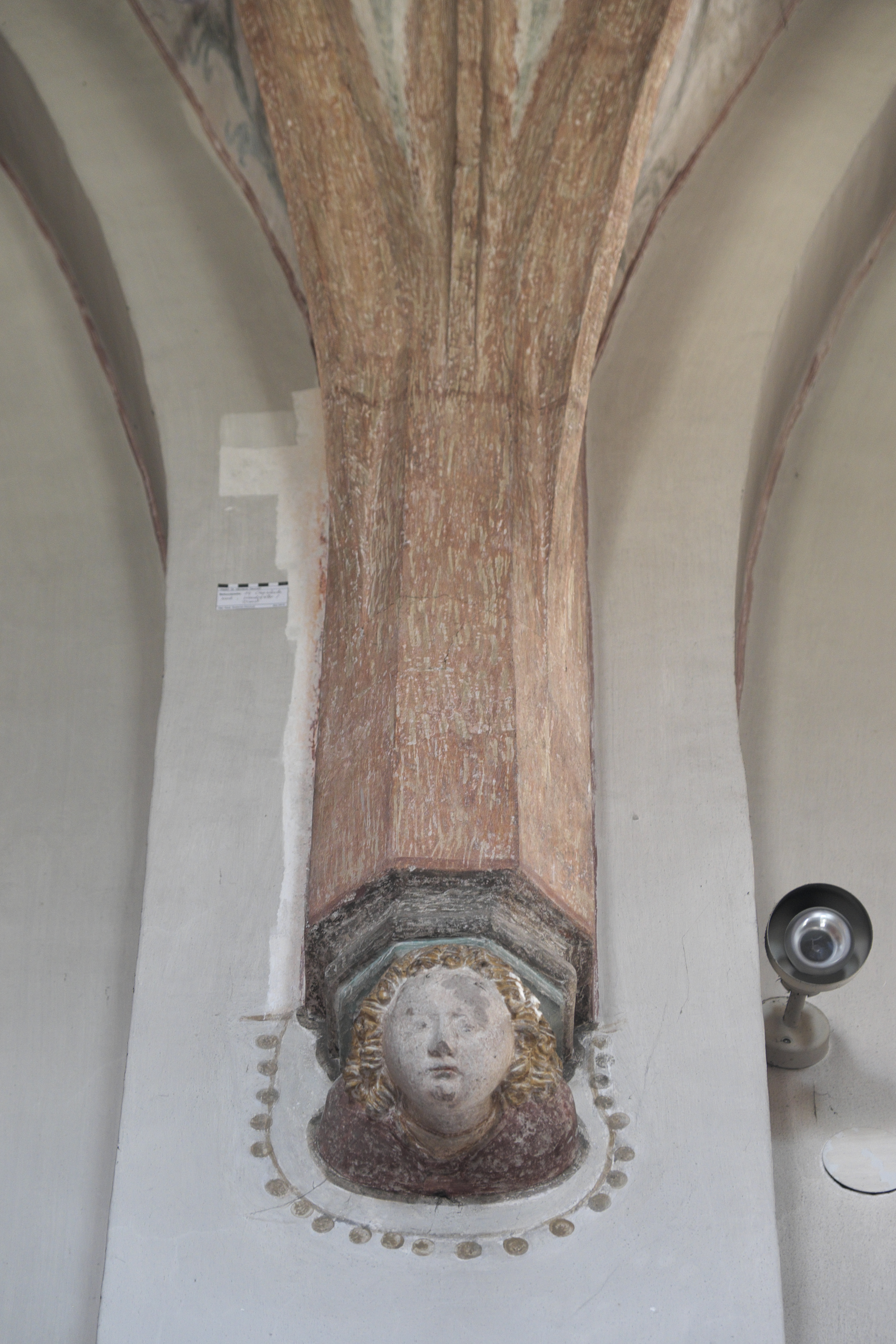 Alte katholische Pfarrkirche St. Nikolaus in Neuried (bei München) im Landkreis München (Bayern, Deutschland), Kopfkonsolen unter dem Netzrippengewölbe im Chor